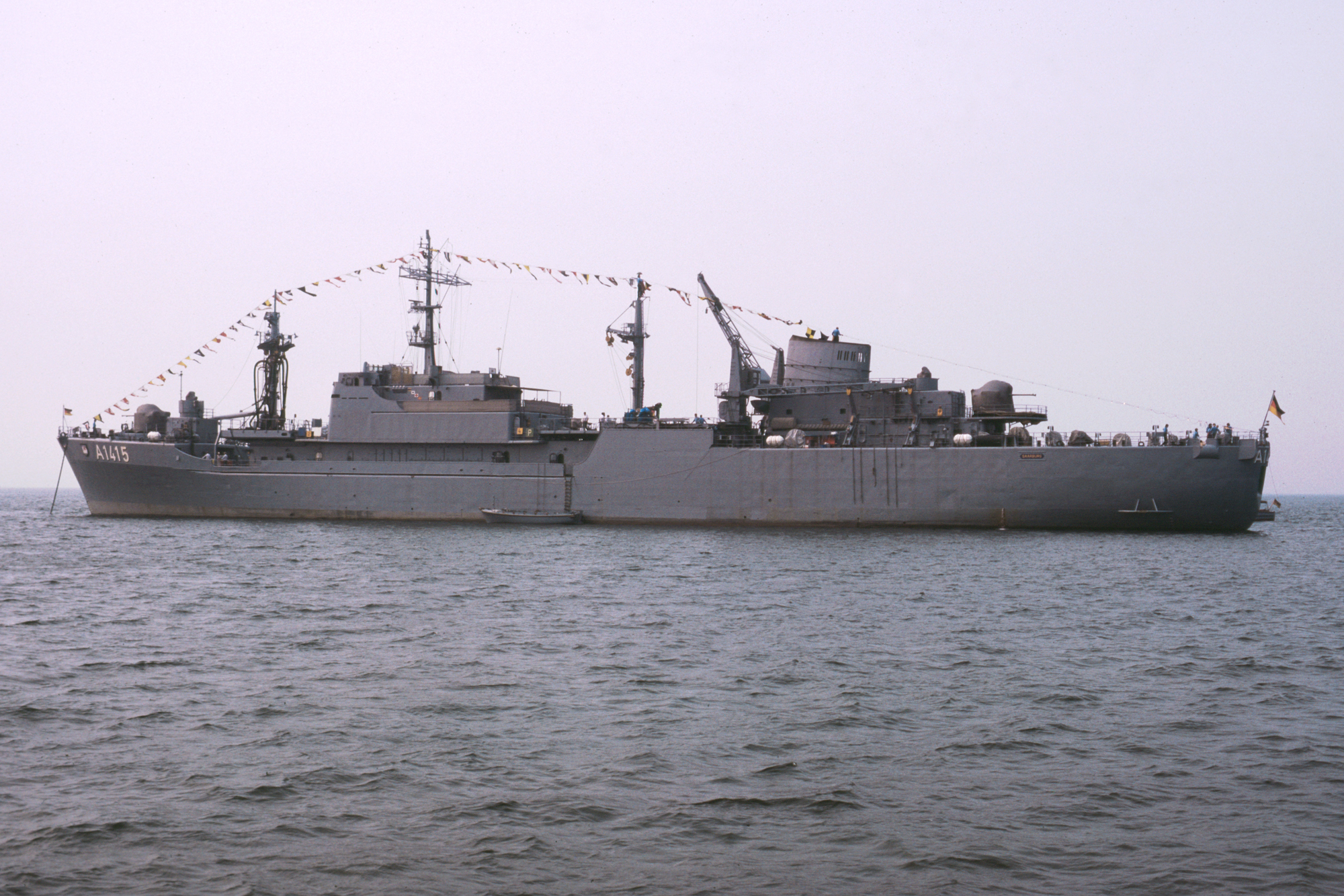 Das Marine-Versorgerschiff Saarburg der Lüneburg-Klasse (Klasse 701) liegt im Sommer 1981 in der Ostsee